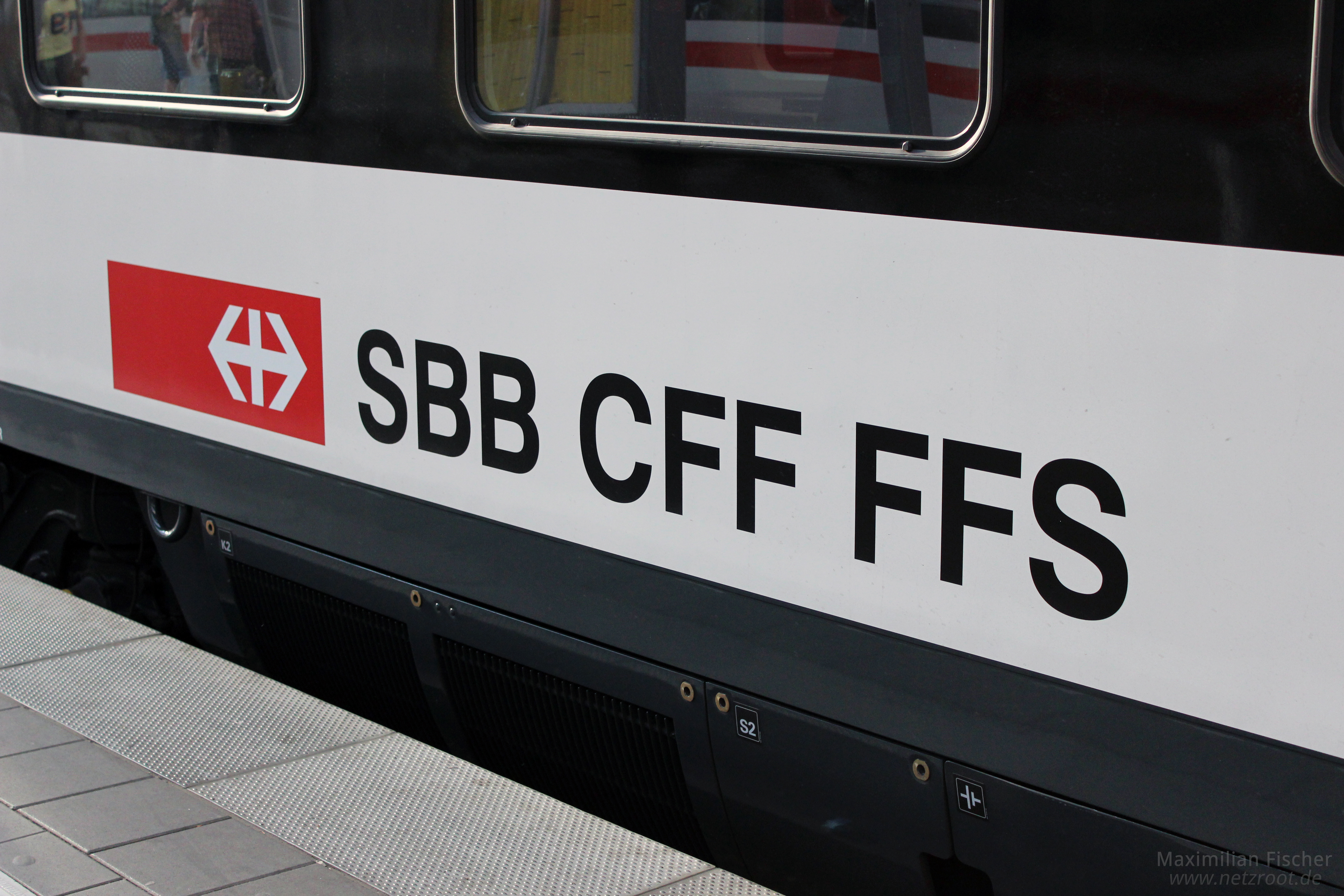 Die SBB-Beschriftung auf einem Wagon, gezogen von zwei BR 218er im Münchner Hauptbahnhof. Hier der gesamte Zug